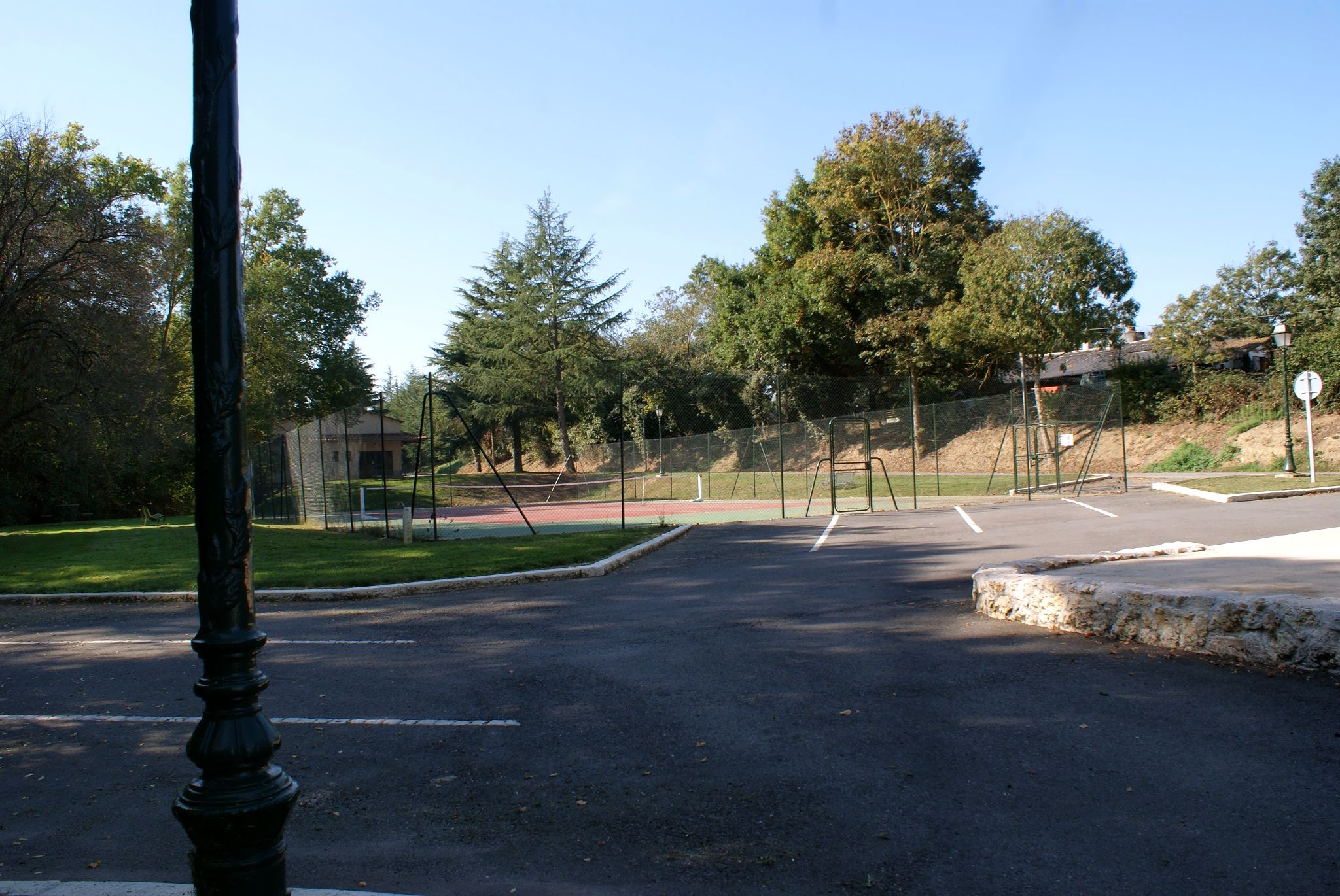 Tennisbaan van Sariac-Magnoac.